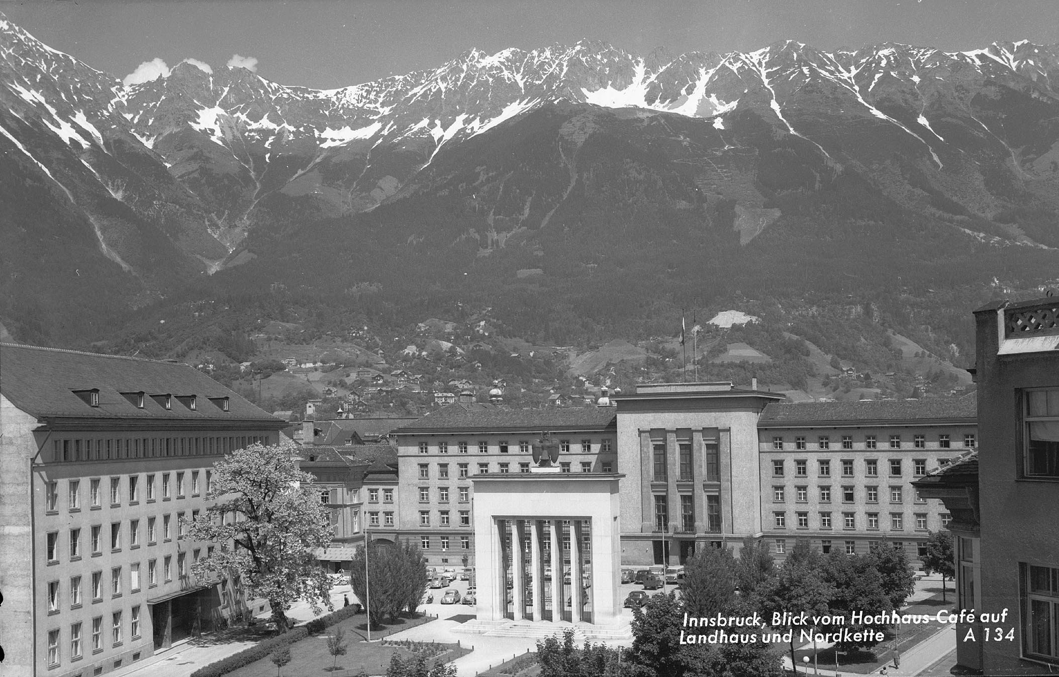 Innsbruck / Blick vom Hochhaus Cafe auf Landhaus und Nordkette